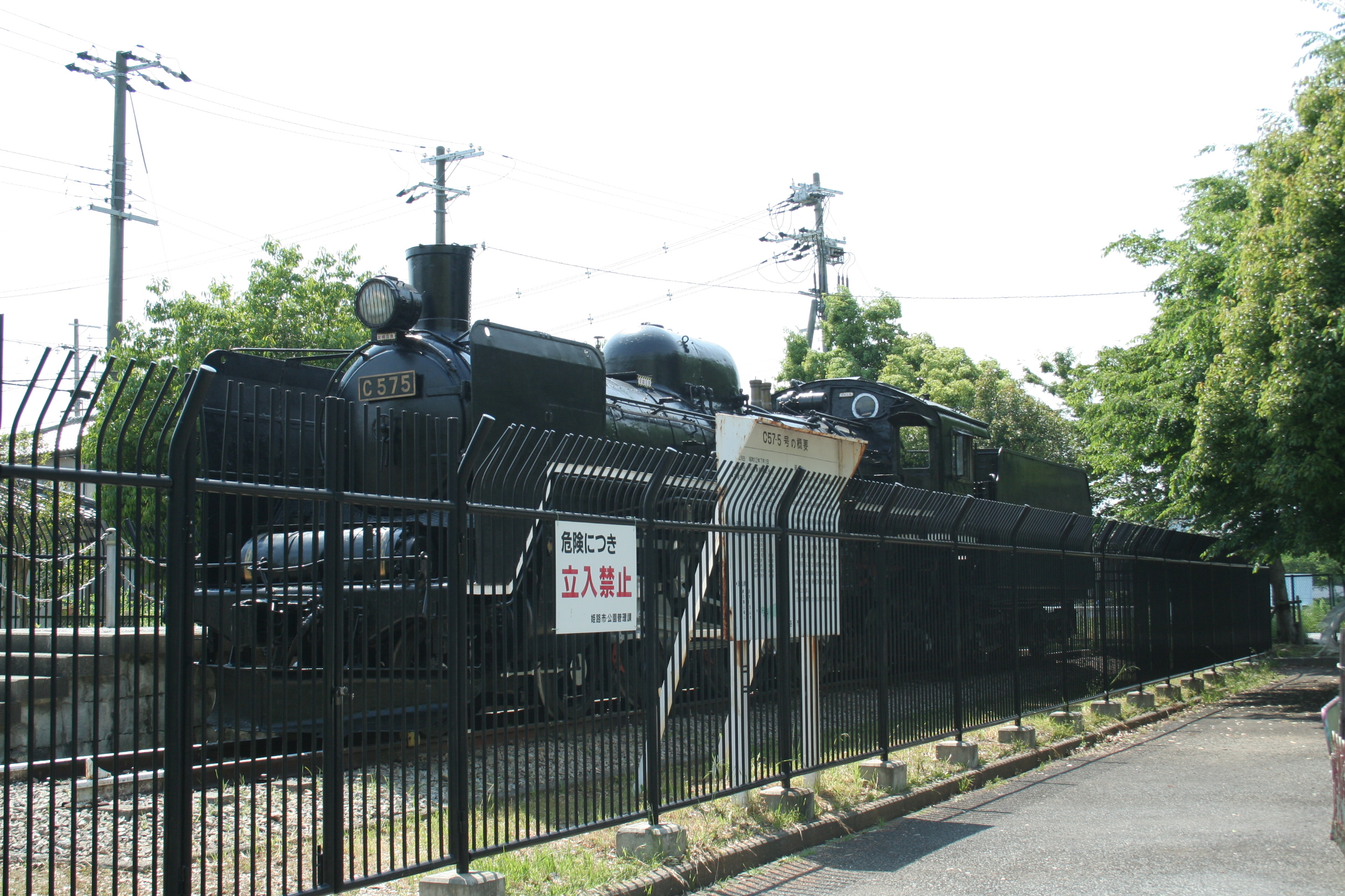 兵庫県姫路市御立西の夢前川東岸にある公園「御立交通公園」の写真。 蒸気機関車「C575」。